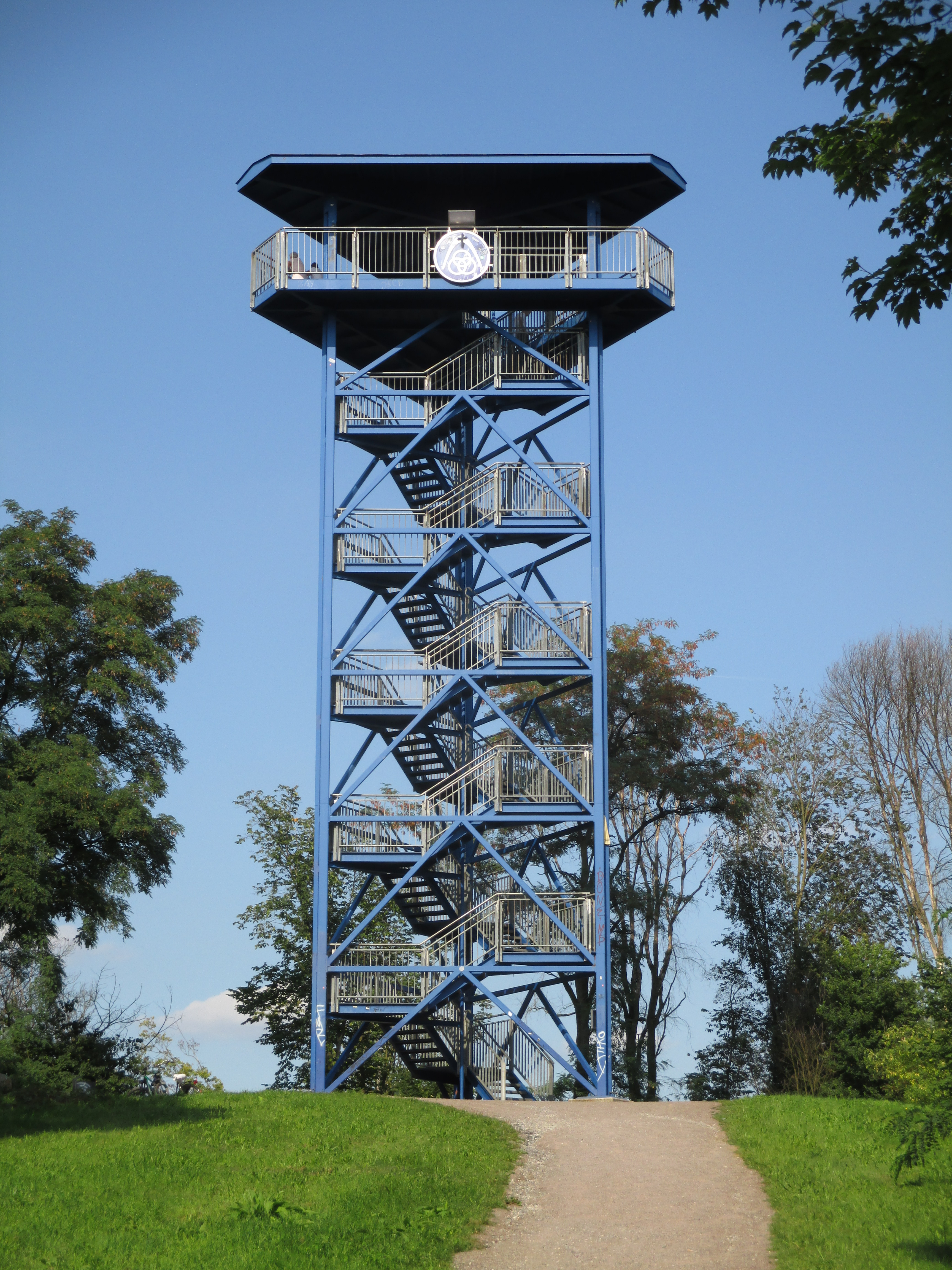 Wolfsberghalde mit Aussichtsturm am Wolfssee in Duisburg.